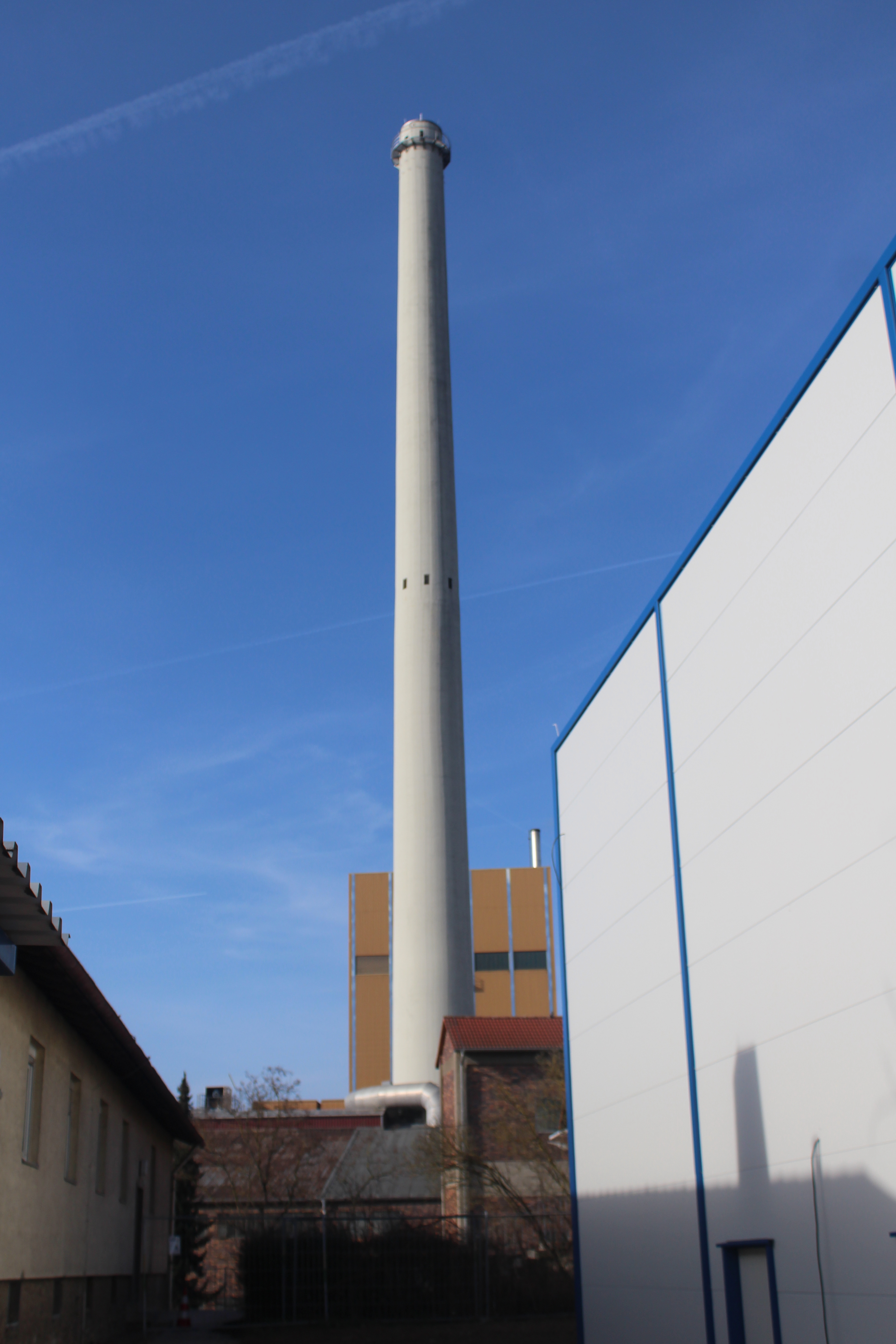 Kamin der Zuckerfabrik Ochsenfurt